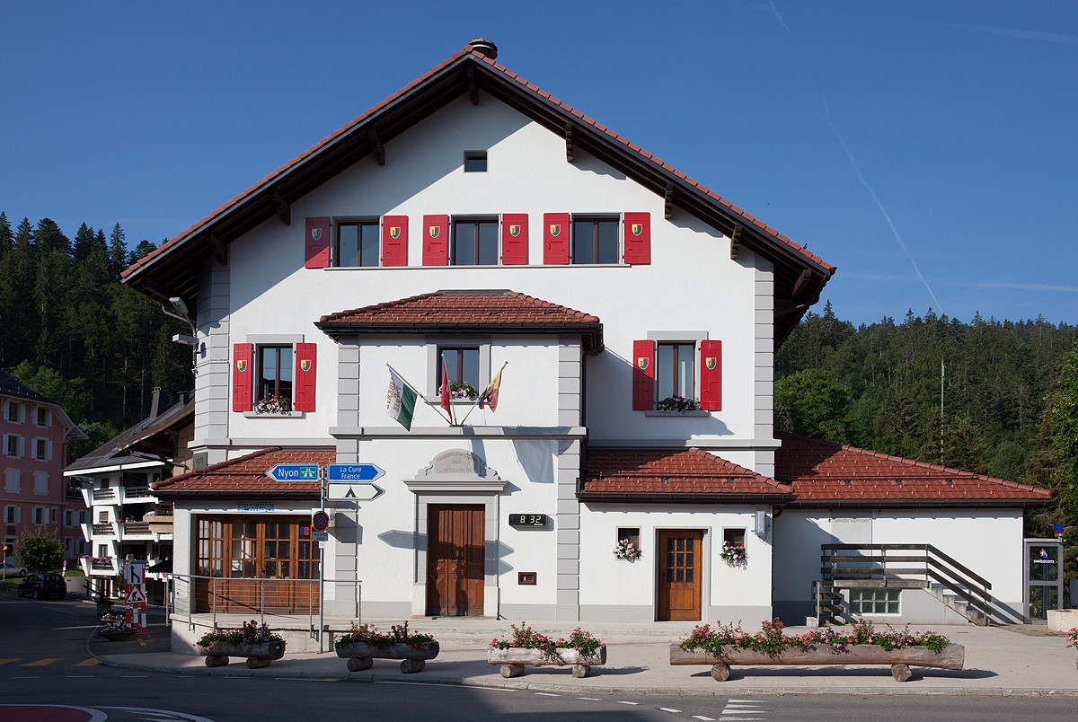 La Mairie du Saint-Cergue